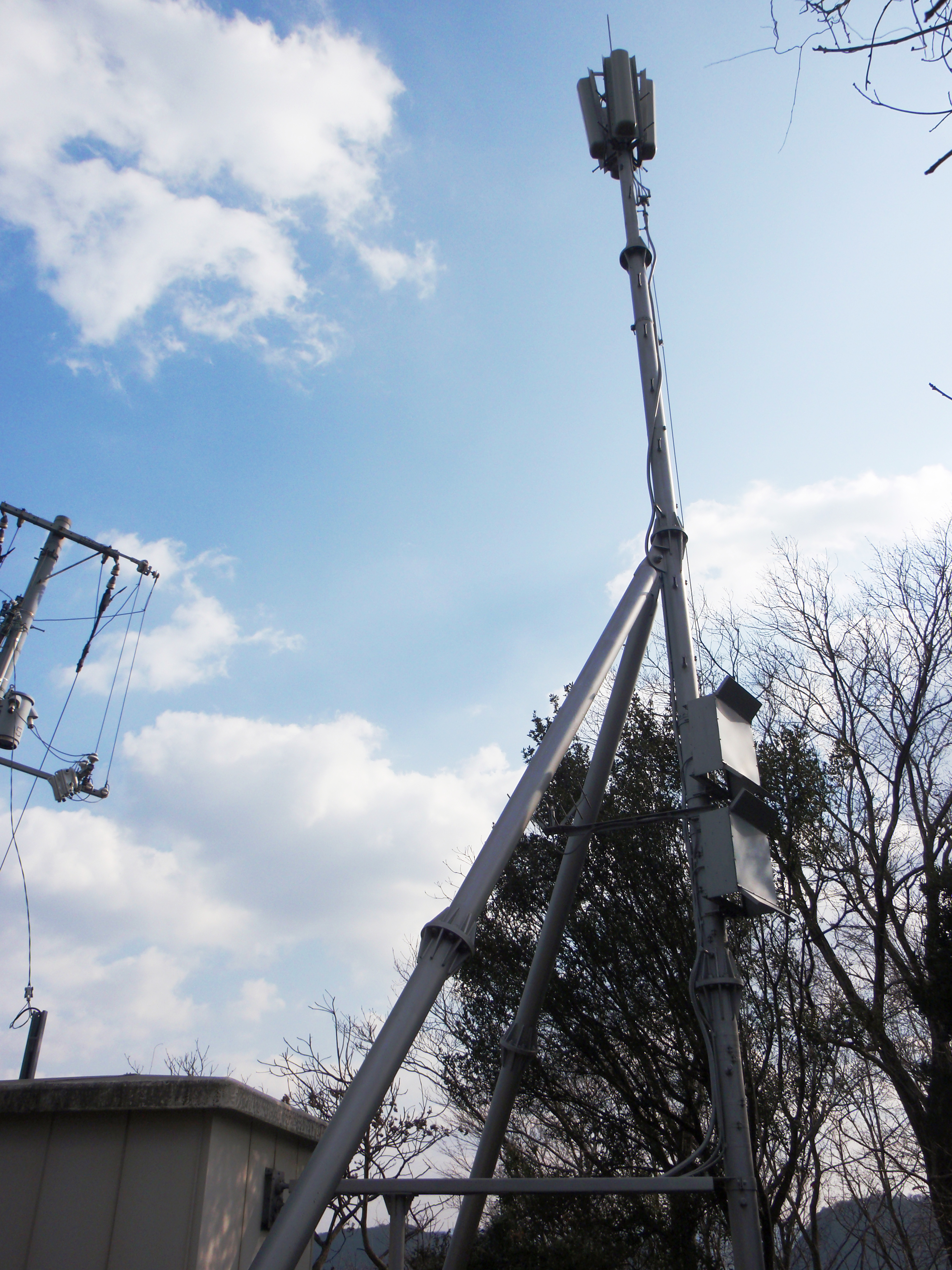 香川県さぬき市にあるNHK志度テレビ中継局。